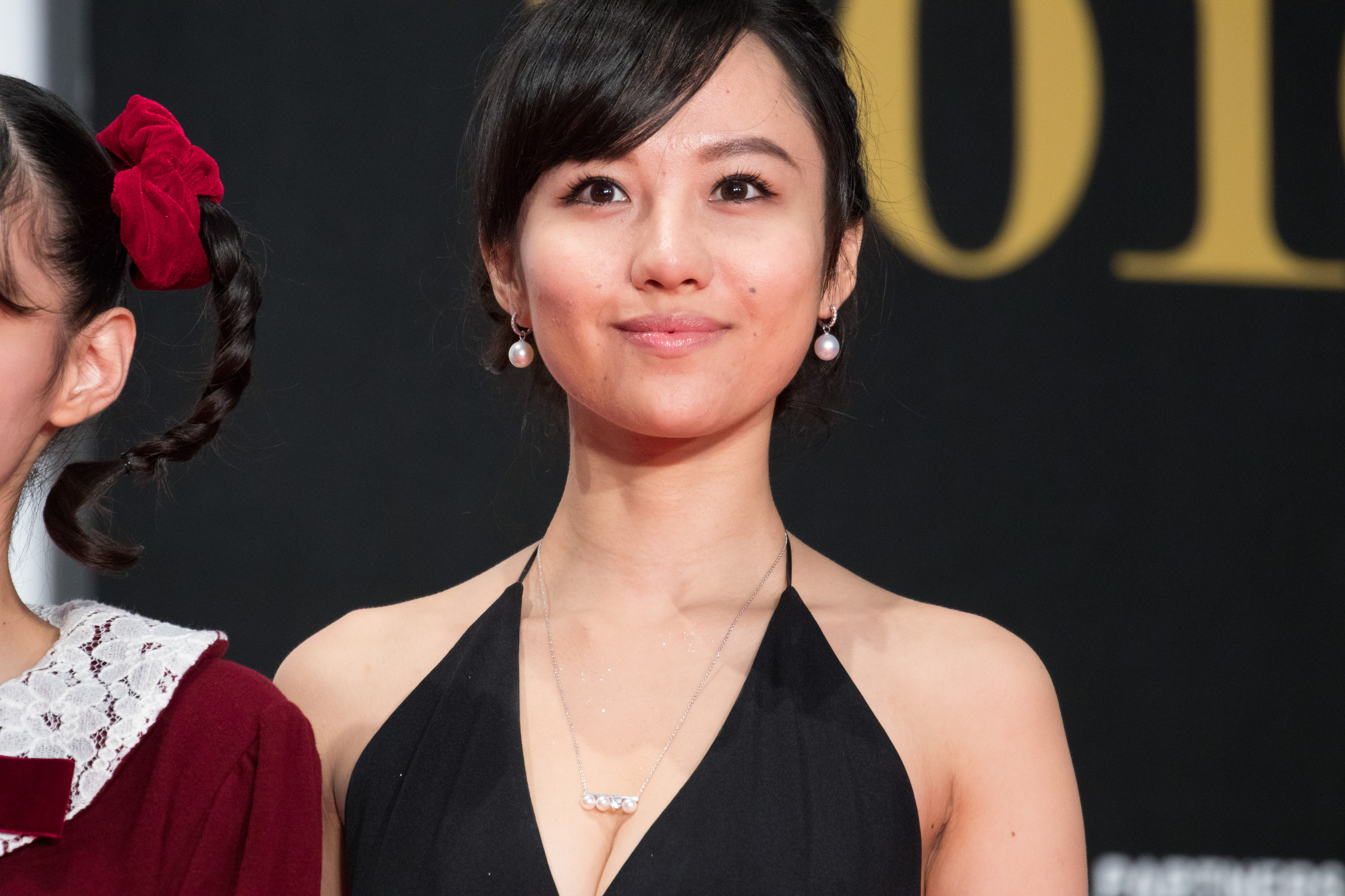 第29回 東京国際映画祭 オープニングセレモニー 谷村奈南 (星くず兄弟の新たな伝説)